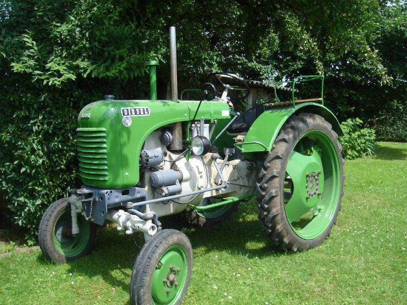 Traktor Steyr Typ 80A